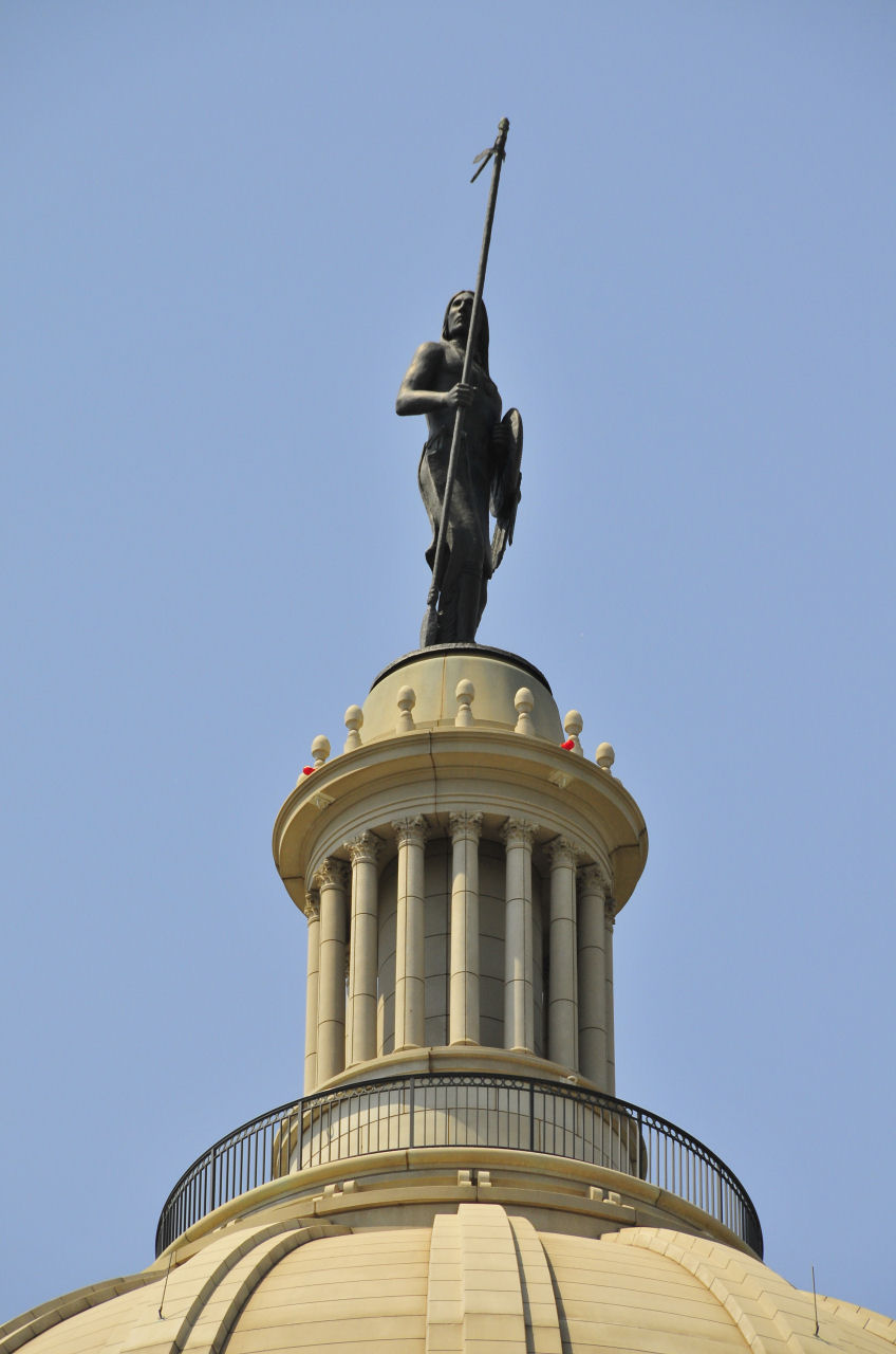 Oklahoma State Capitol - Dome